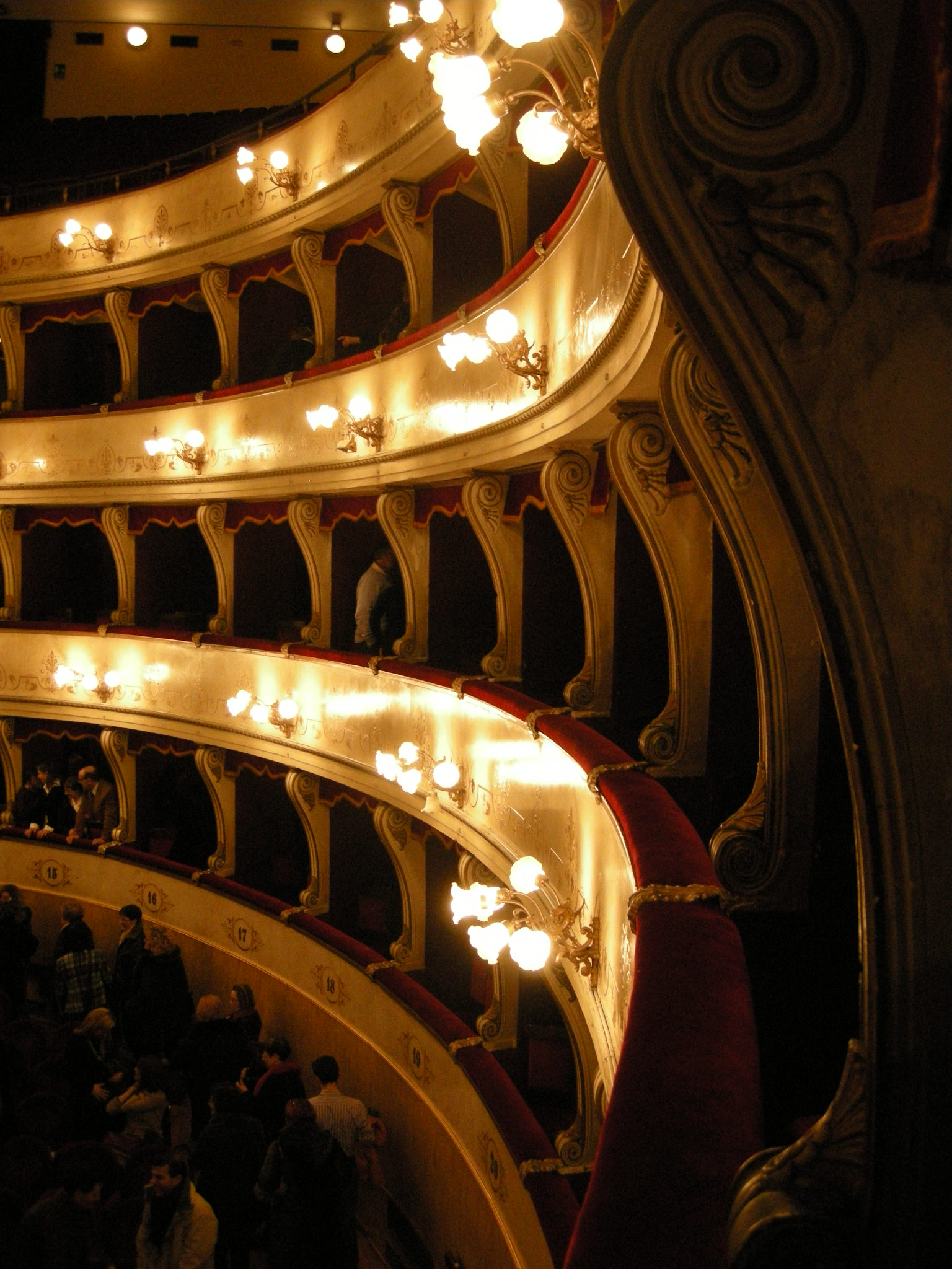 Teatro manzoni di pistoia, 13